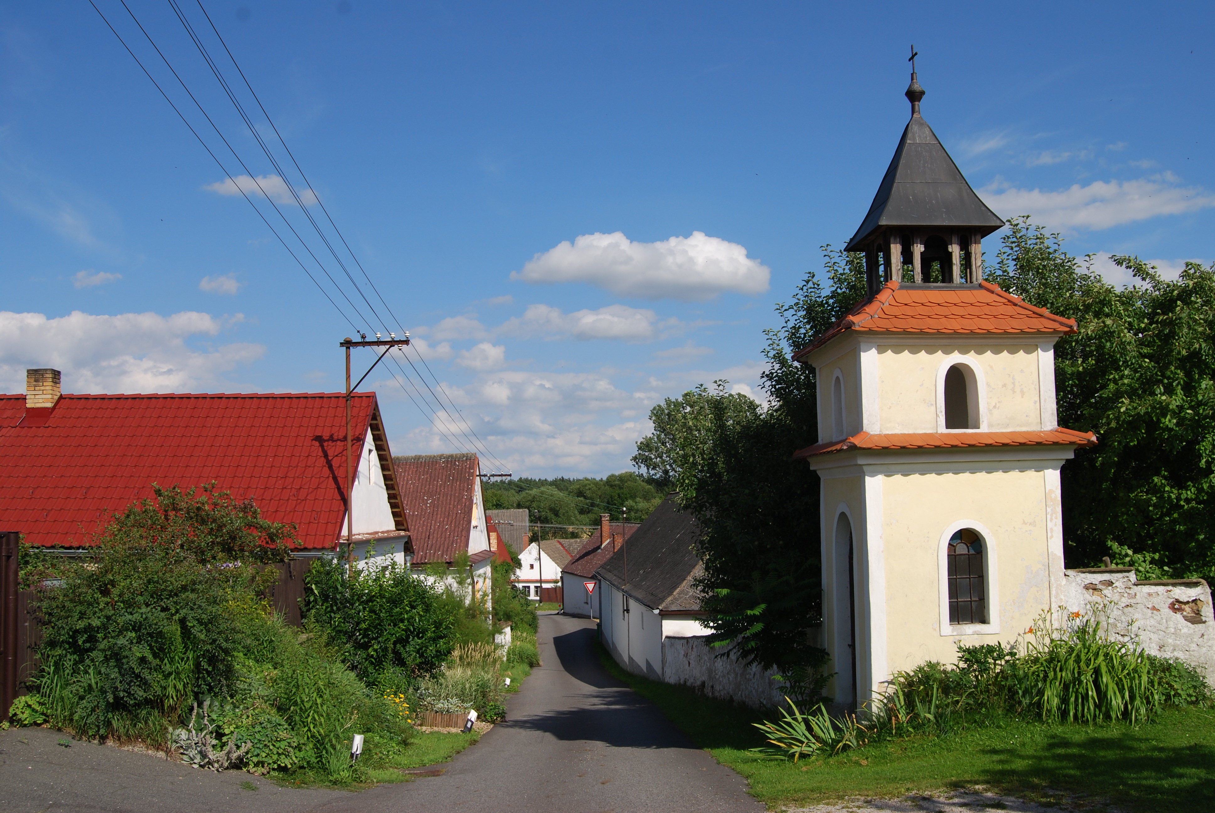 Pohled na část obce a zvoničku. Kolišov je část obce Bernartice v okrese Písek. Česká republika.